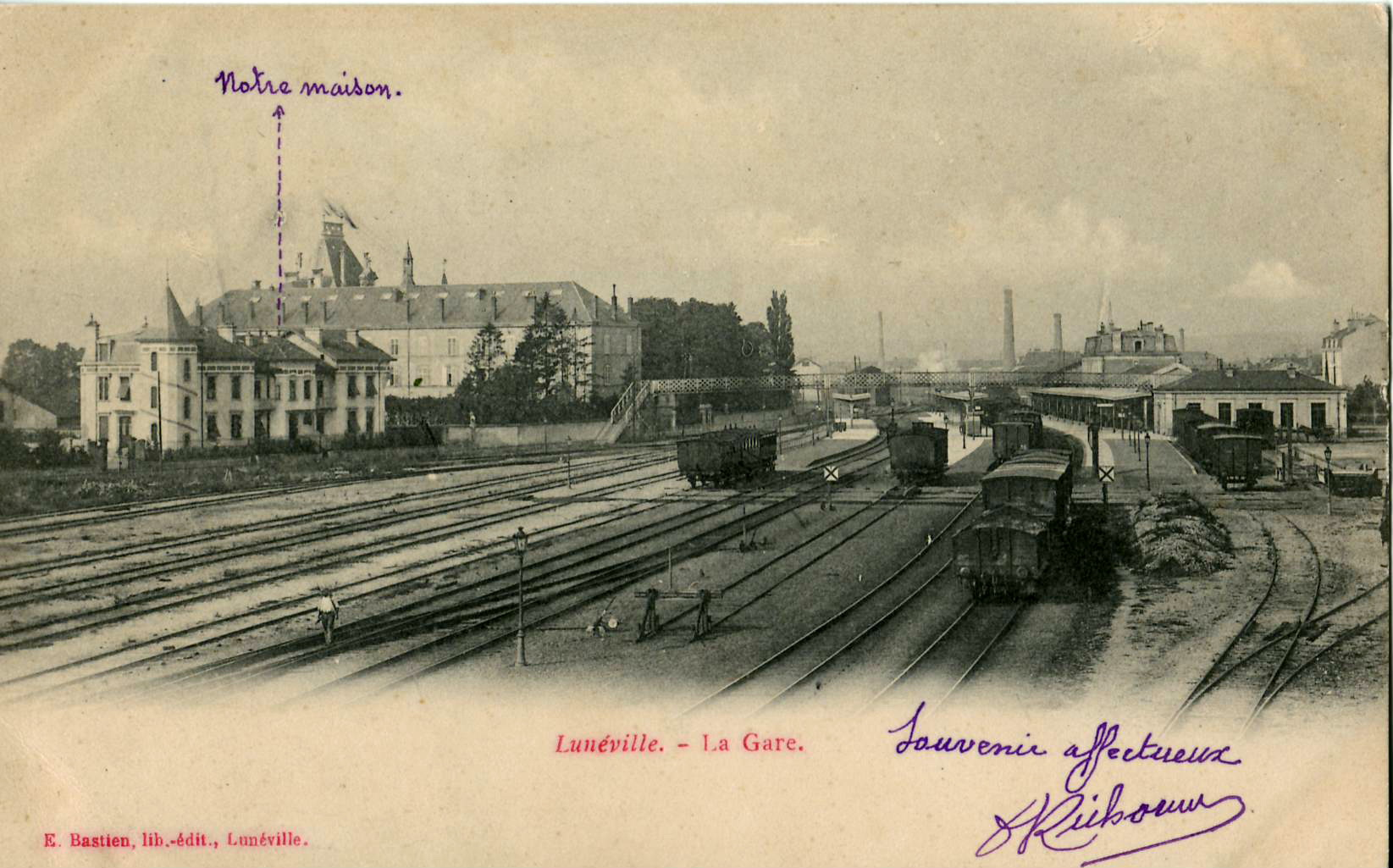 Carte postale ancienne éditée par E. Bastien, libraire-éditeur à Lunéville : LUNÉVILLE - La Gare